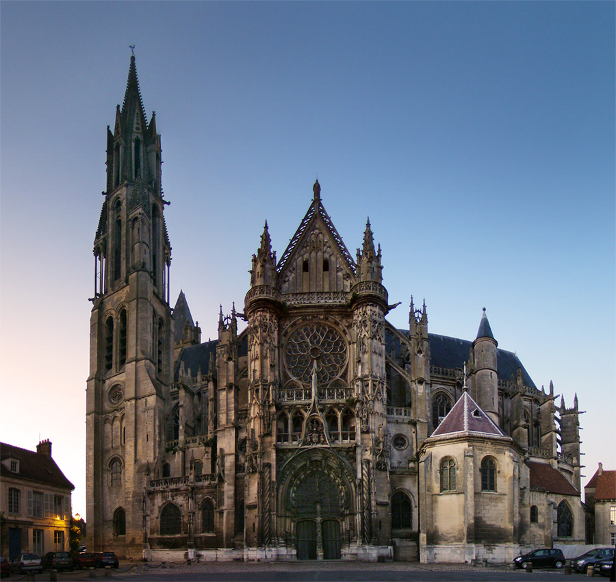 Notre-Dame de Senlis, Oise, Picardie, France.